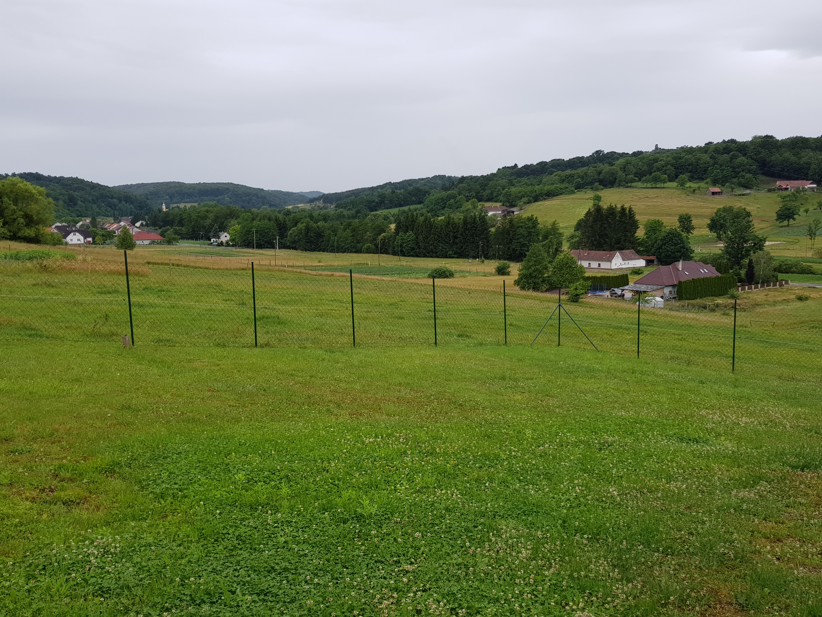 Felsőszölnök látkép a Szlovén Mintagazdaság felől